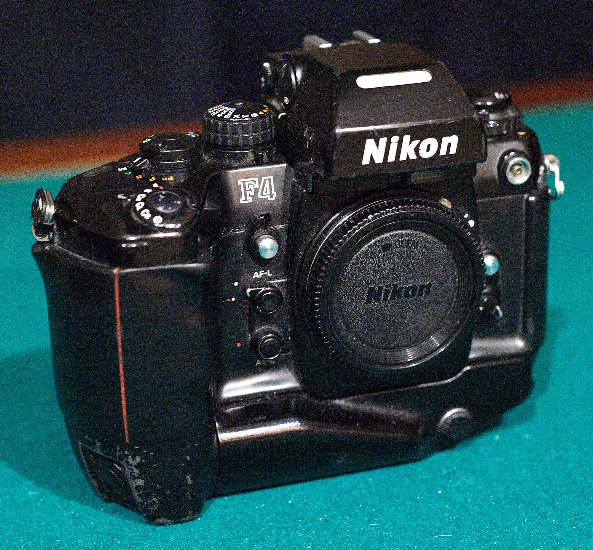 old nikon F4 + Battery Pack MB-21